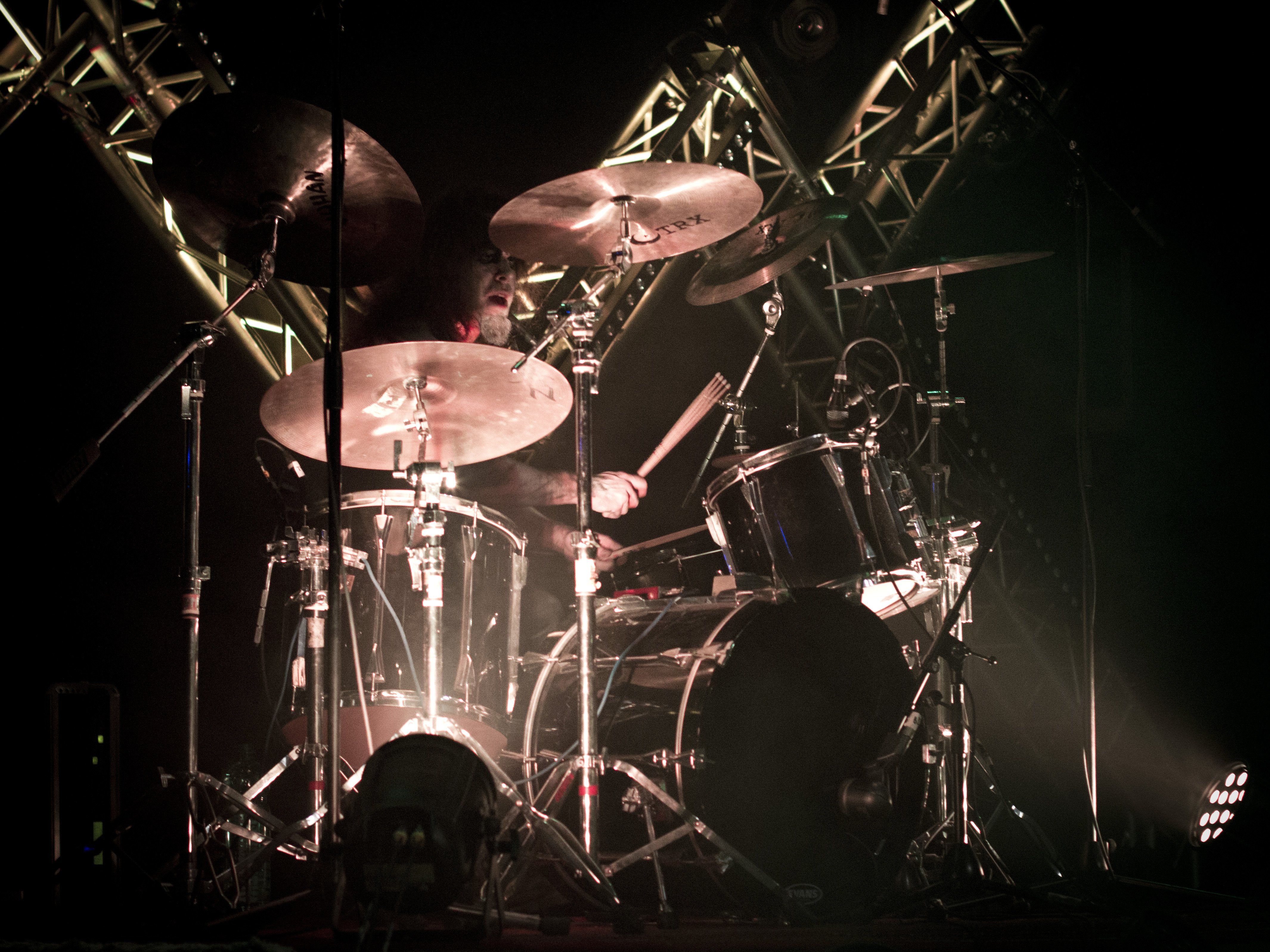 Michael Cook du groupe de unblack A Hill to Die Upon au Elements of Rock 2012.